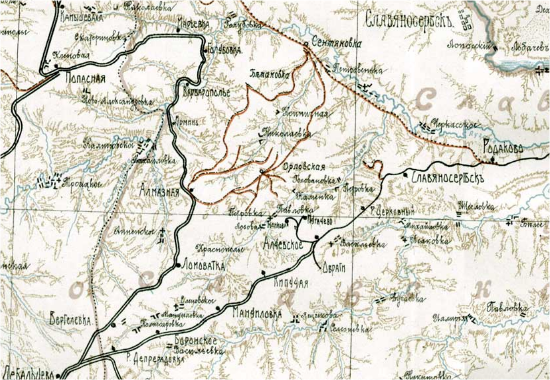 По Екатерининской железной дороге. Вып. II. – Екатеринослав, 1912